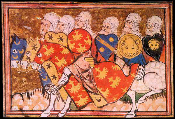 l'armée de Saladin - Guillaume de Tyr, Histoire d'Outremer. Manuscrit enluminé sur parchemin (300 feuillets, 40 x 30 cm). Paris, 1337. BnF, Manuscrits (Fr 22495 fol. 229v)